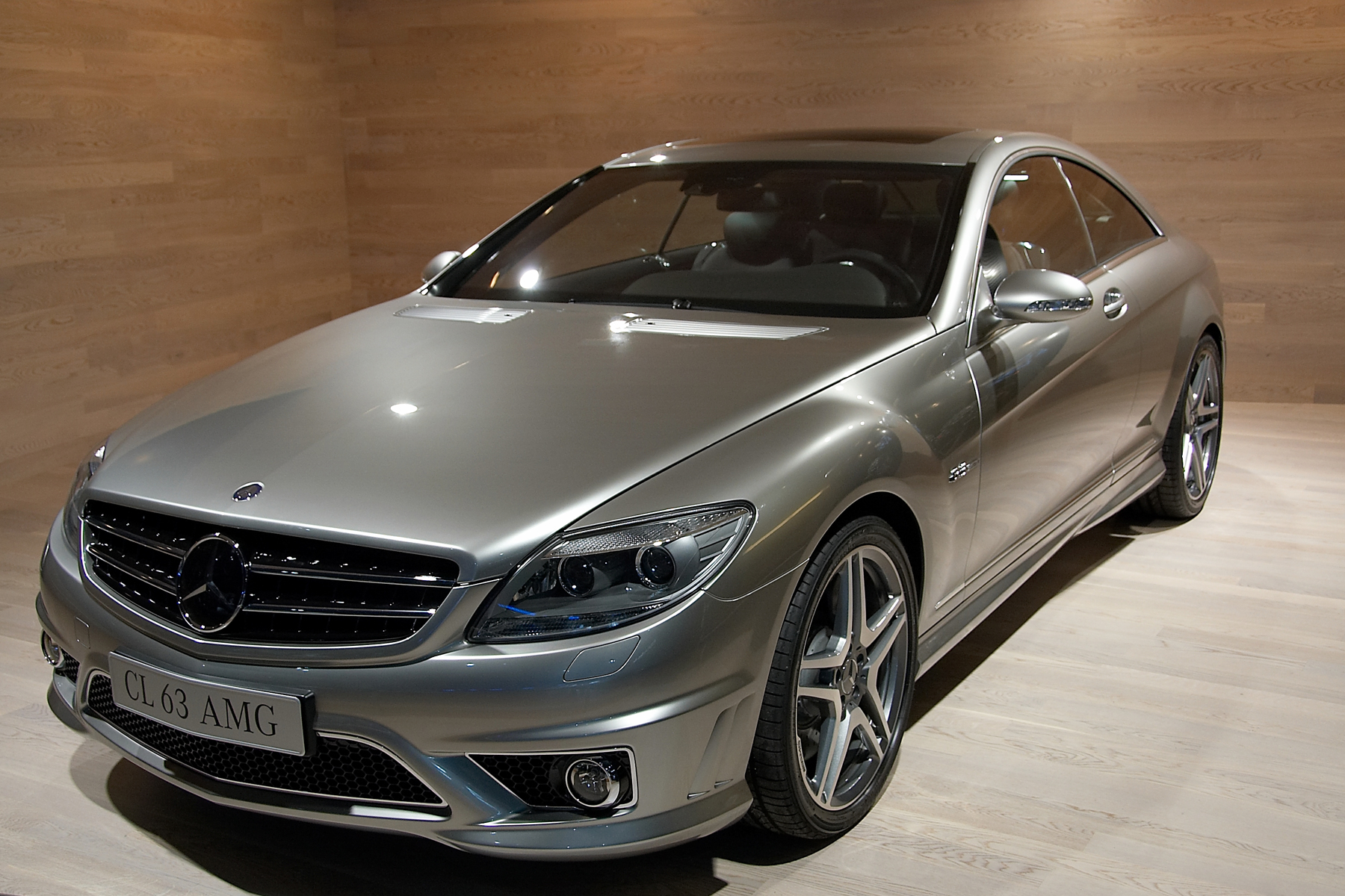 CL 63 AMG (C216)Mondial de l'Automobile Paris 2006